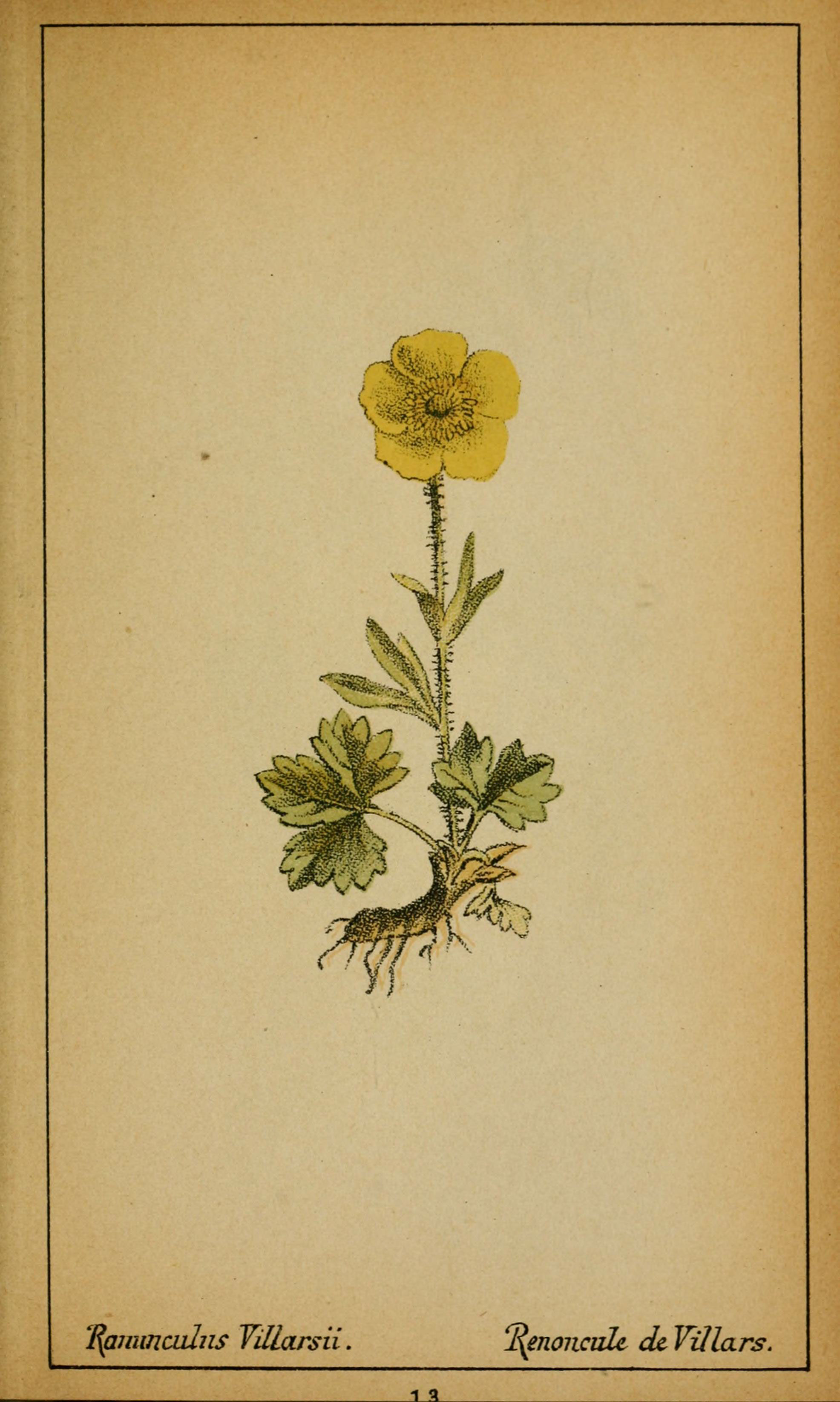 'B^nunadns Villarsii. ^noncuU de VÛh ars. 1 .t